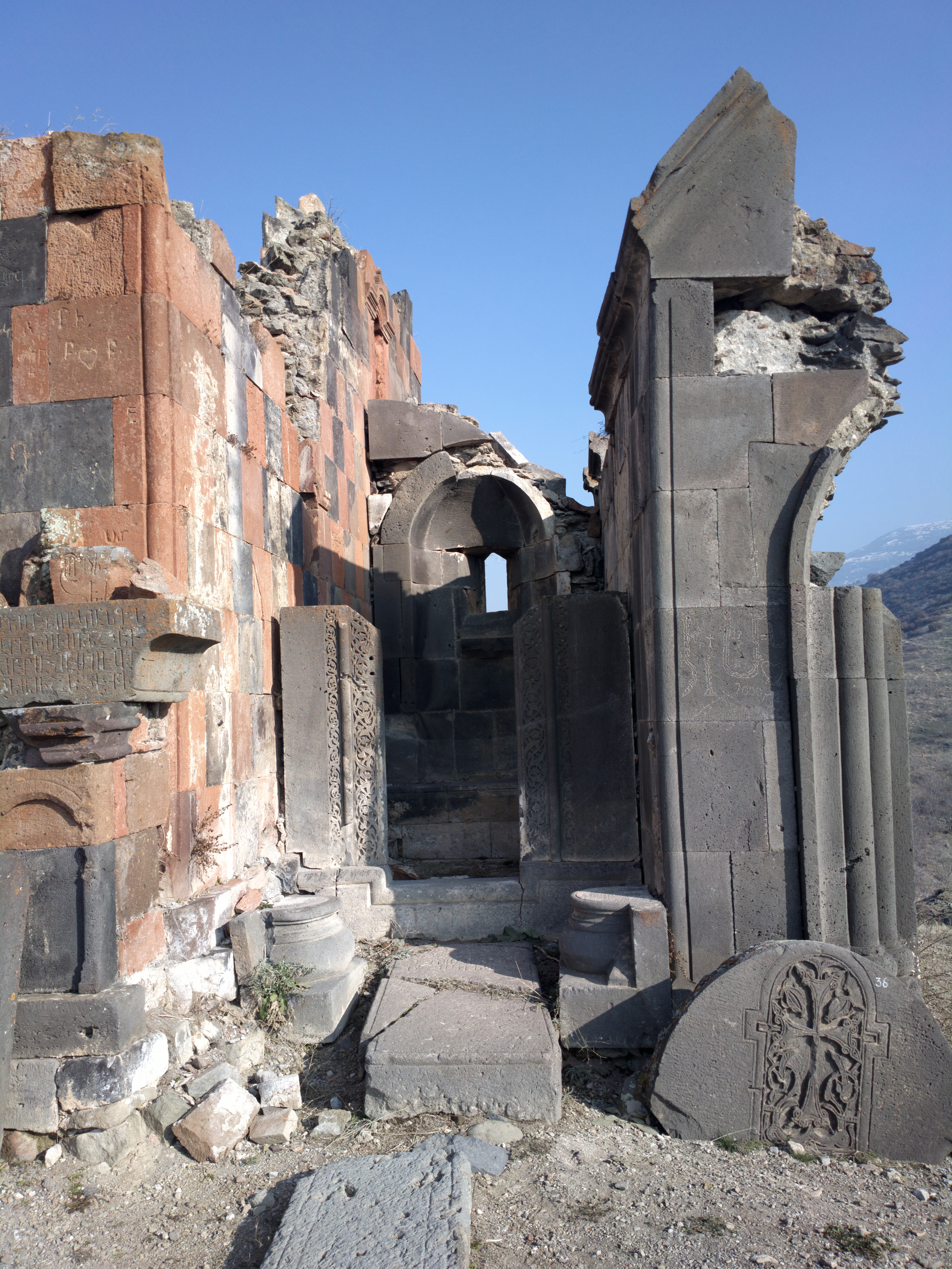 Հավուց Թառ վանքի Ամենափրկիչ եկեղեցին 99.4/3.1